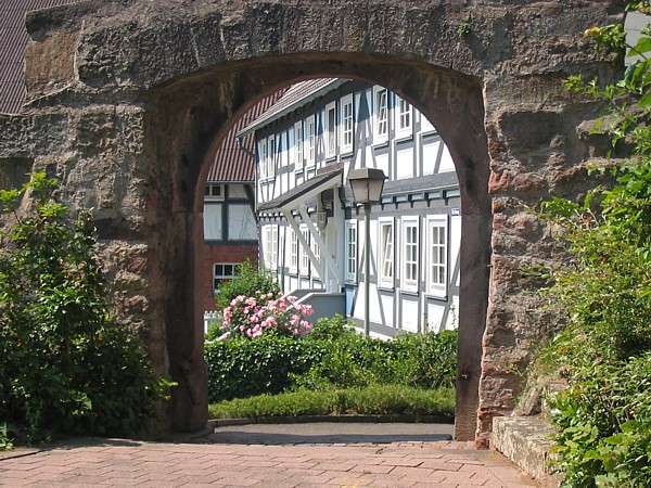 Wartenberg-Landenhausen. Ein Anblick, wie man ihn in Wartenberg oft antrifft. Seit dem hohen Mittelalter bis ins 19. Jahrhundert war der Fachwerkbau die am weitesten verbreitete Bauweise für Hochbauten nördlich der Alpen.